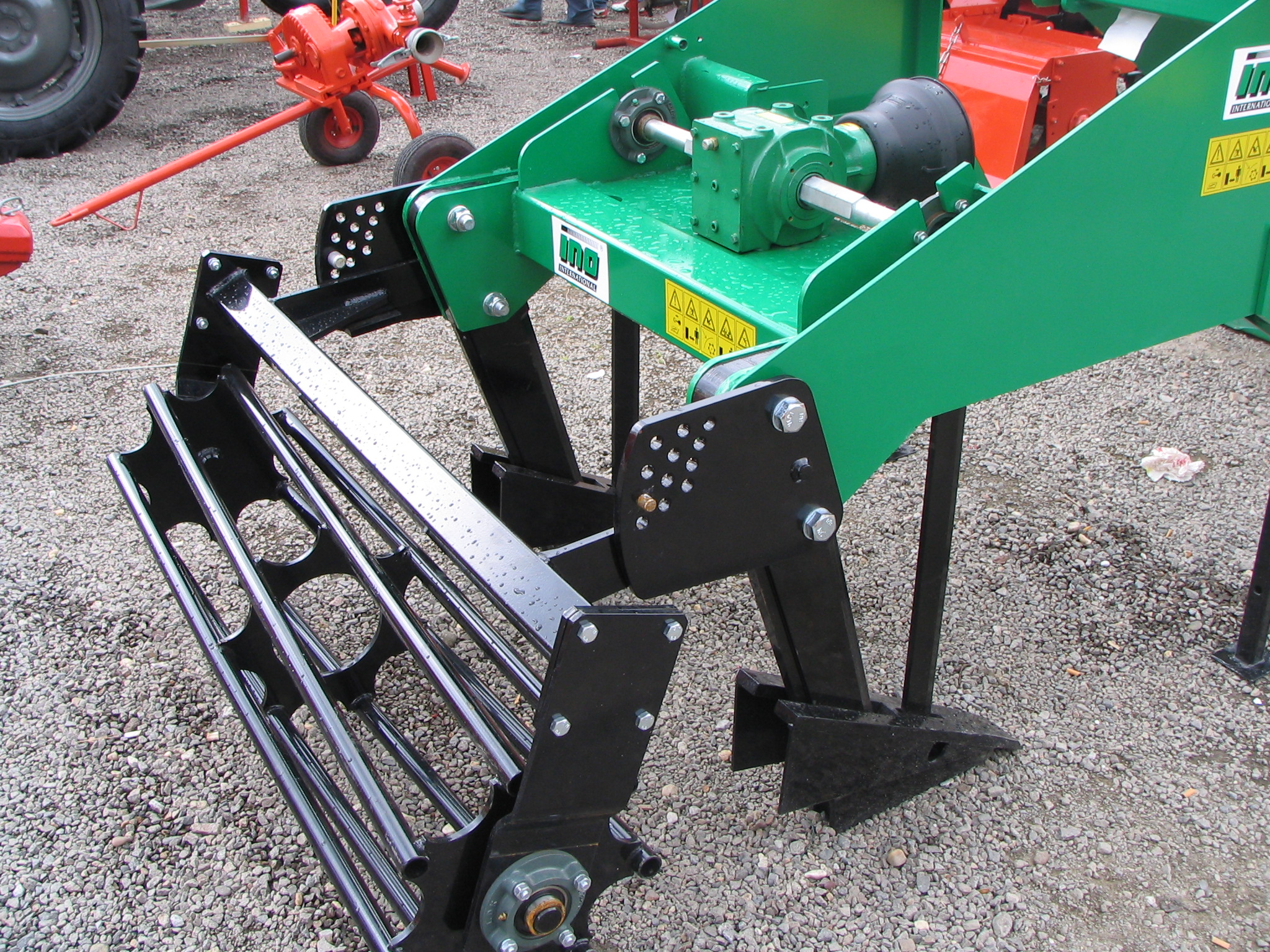 Подривач са два радна тела и динамичким стопама (Пољопривредни сајам у Новом Саду 2006.)(фото: Михаило Грбић)